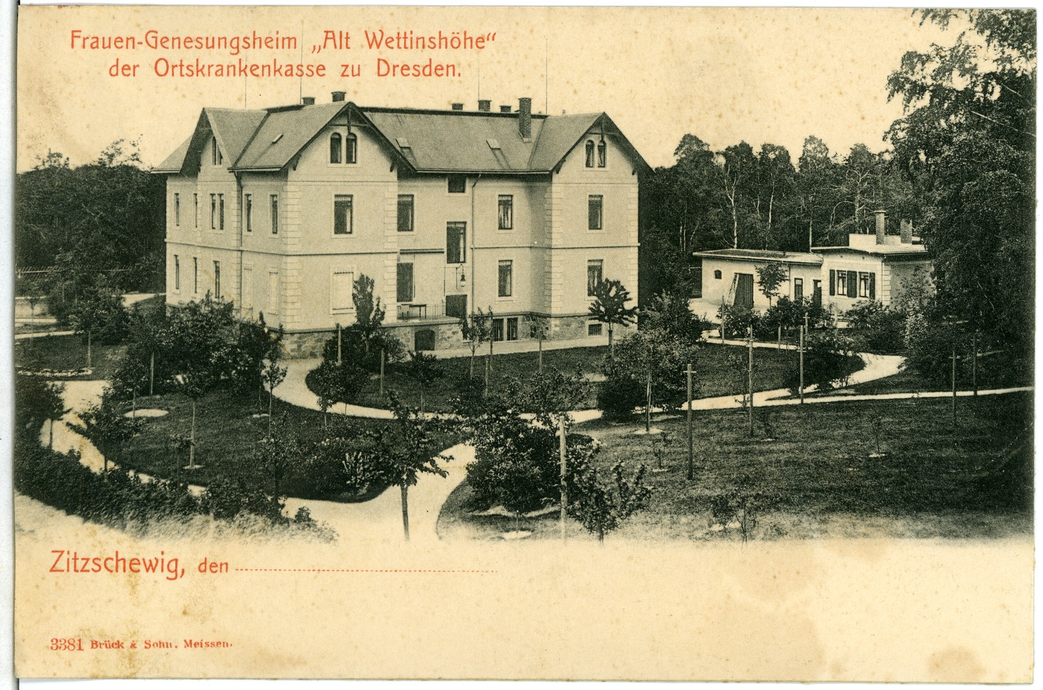 Zitzschewig; Frauengenesungsheim Alt Wettinhöhe This postcard is from publisher Brück & Sohn in Meißen ( postcard has a unique number 03381 and is available in a higher resolution at the publisher. This images was uploaded in a cooperation project between Wikipedians and the publisher.